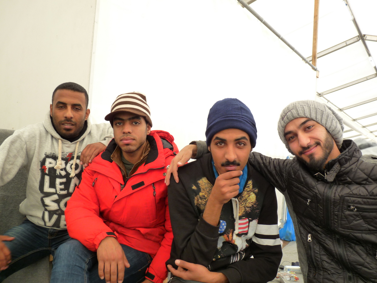 Begunci v Dobovi